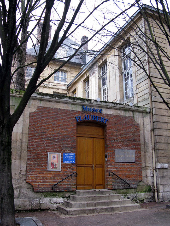 Vu du portail et de la maison d'enfance de Gustave Flaubert à Rouen, rue de Lecat, aujourd'hui musée.